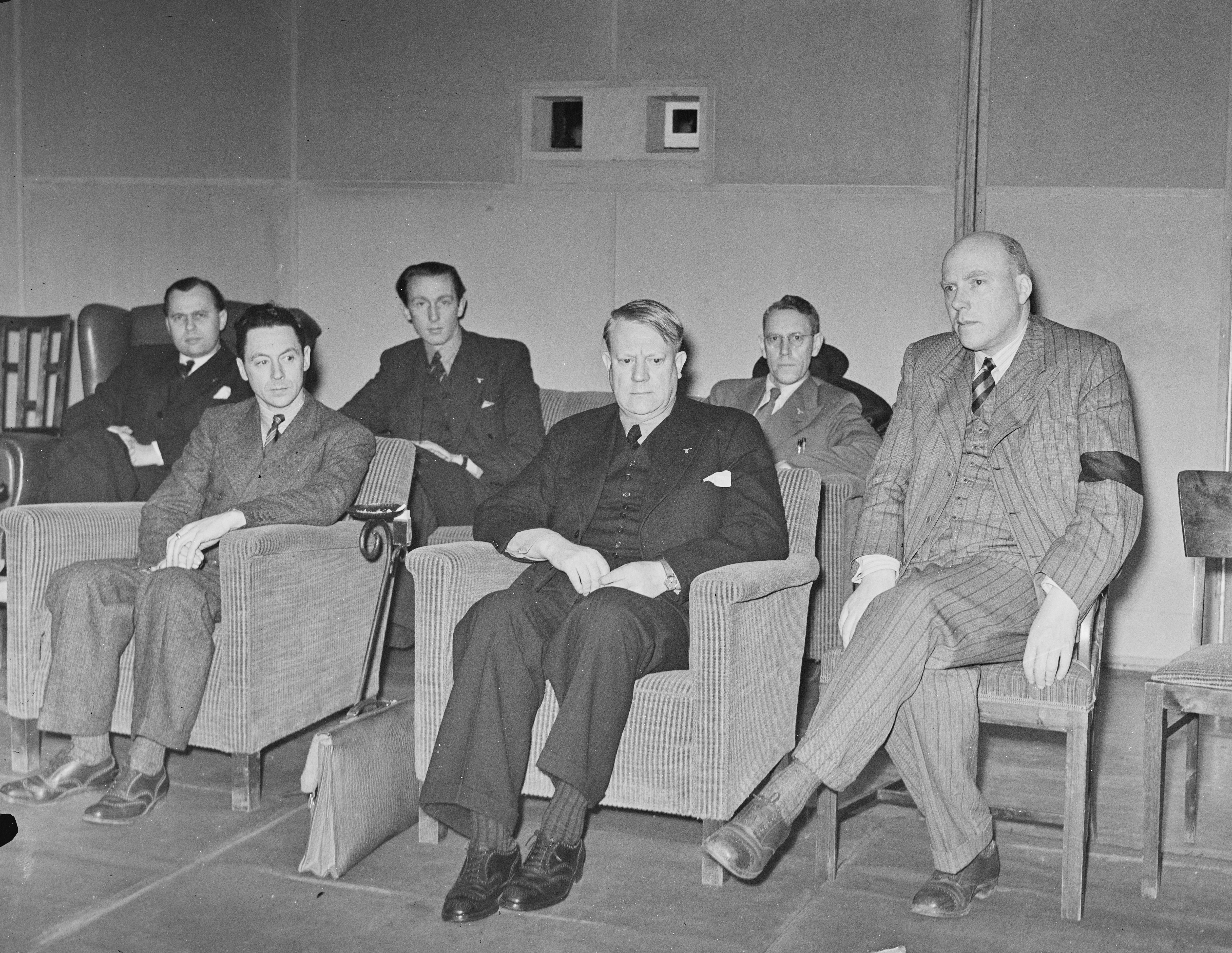 Vidkun Quisling på besøk i Filmdirektoratet. Quislings besøk i filmdirektoratet blir omtalt Aftenpostens morgenutgave lørdag 4. april 1942 under overskriften Ministerpresidenten ser på nye norske klturfilmer. Der er bildet gjengitt med følgende bildetekst: Førerens besøk i Statens Filmdirektorat. Fra venstre: Minister Fuglesang, minister Lunde, ekspedisjonssjef Holst, Føreren, pressedirektør Beggerud og direktør Sinding. (fot. NTB) Den korte reportasjen lyder slik: Ministerresidenten var onsdag innbudt av sjefen for Kultur- og Folkeopplysningsdepartementet, minister, dr. Gulbrand Lunde, til fremvisning av nye kulturfilmer fra Nord-Norge og Telemark. Det blev også vist fram noen ukerevyer. Foruten minister Lunde, var også minister Fuglesang, filmdirektør Sinding, pressedirektør Beggerud og ekspedisjonssjef Holst tilstede.